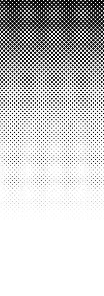 Schwarz-Verlauf